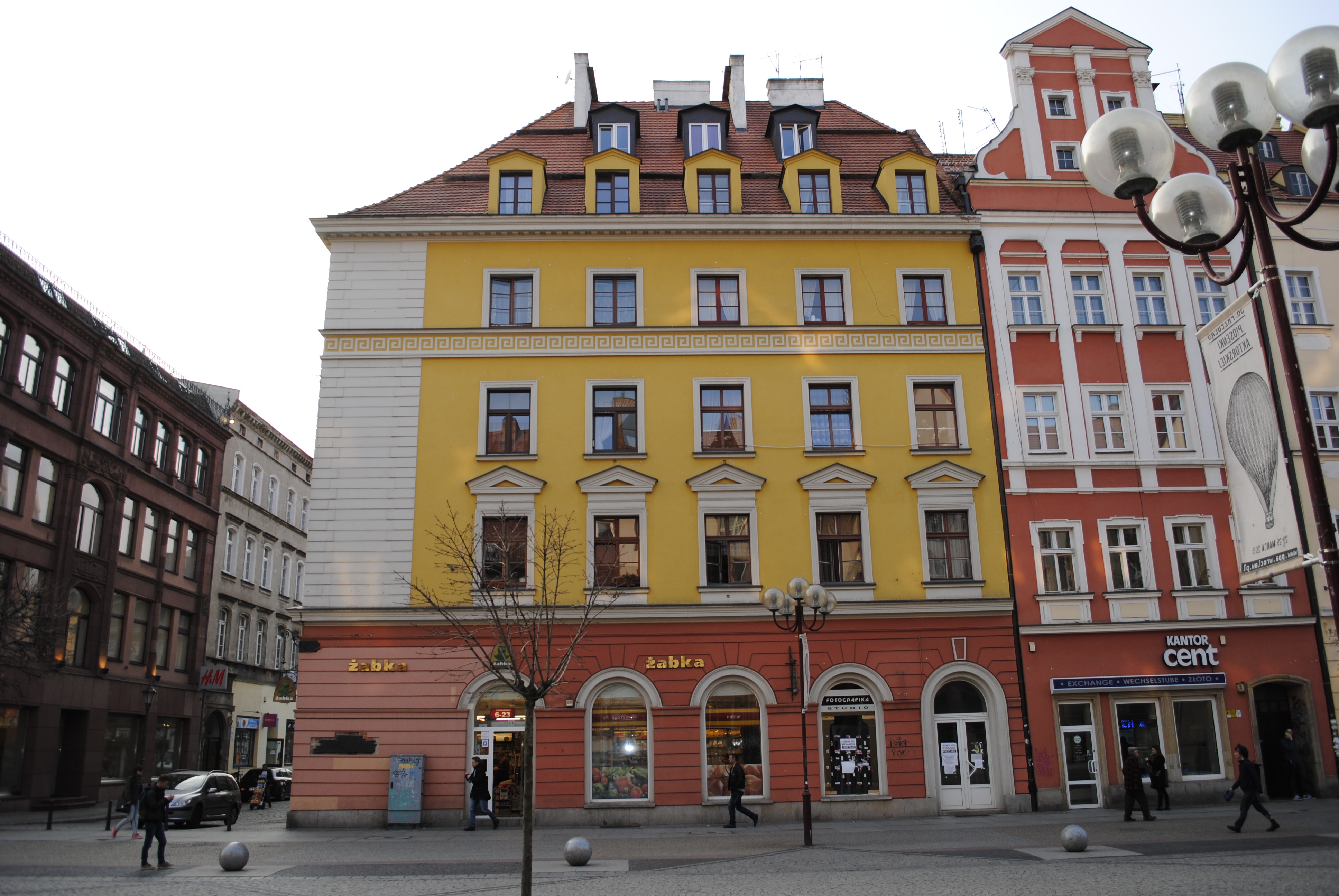 Haus Schweidnitzer Straße Nr. 5